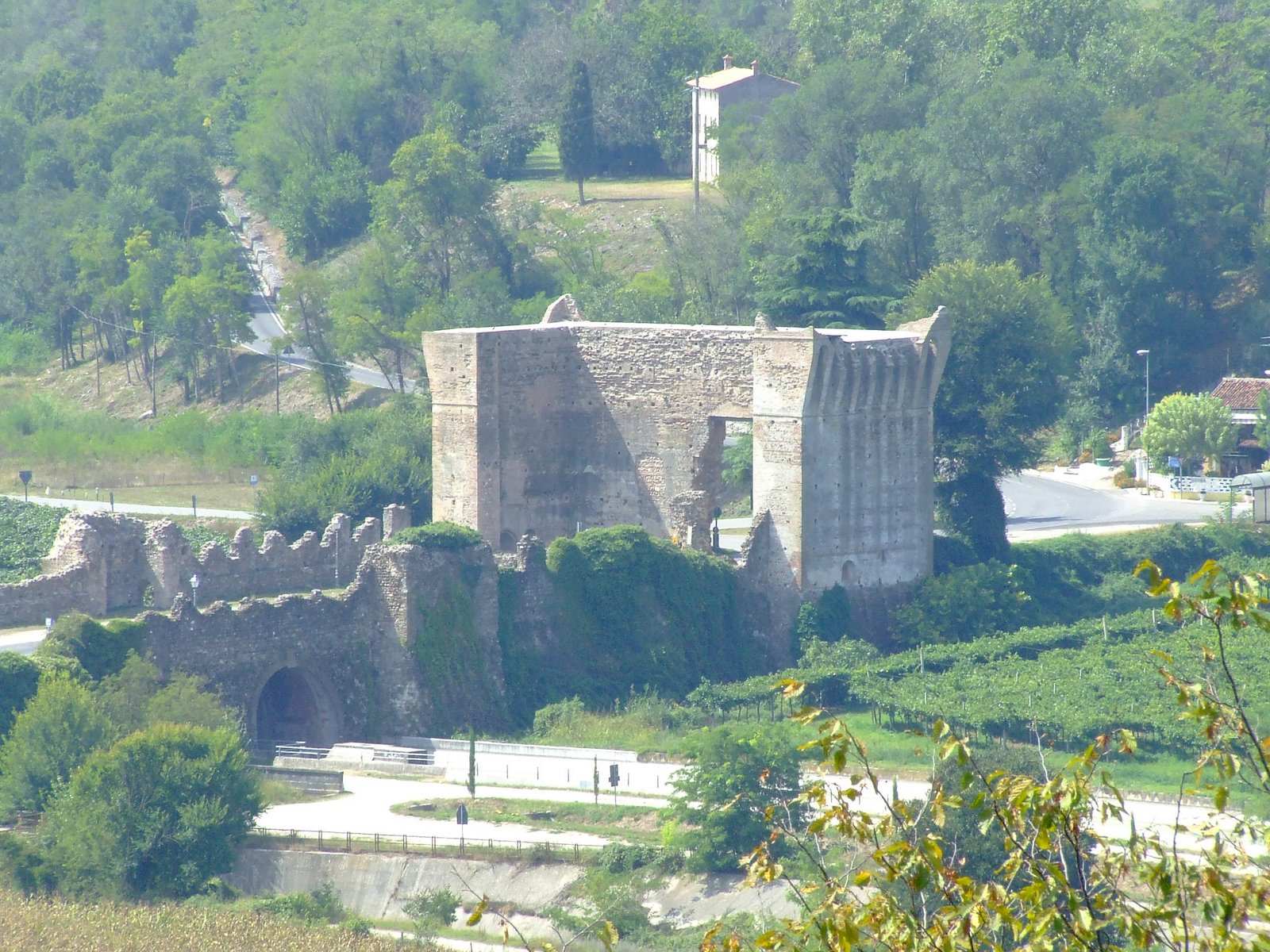 dettaglio del ponte Visconteo a Borghetto